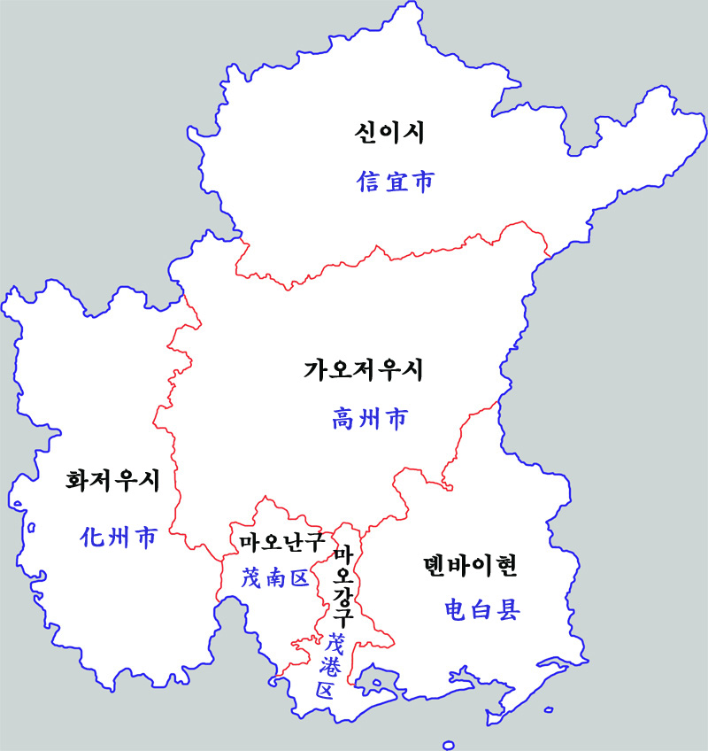 마오밍시 현급행정구약도